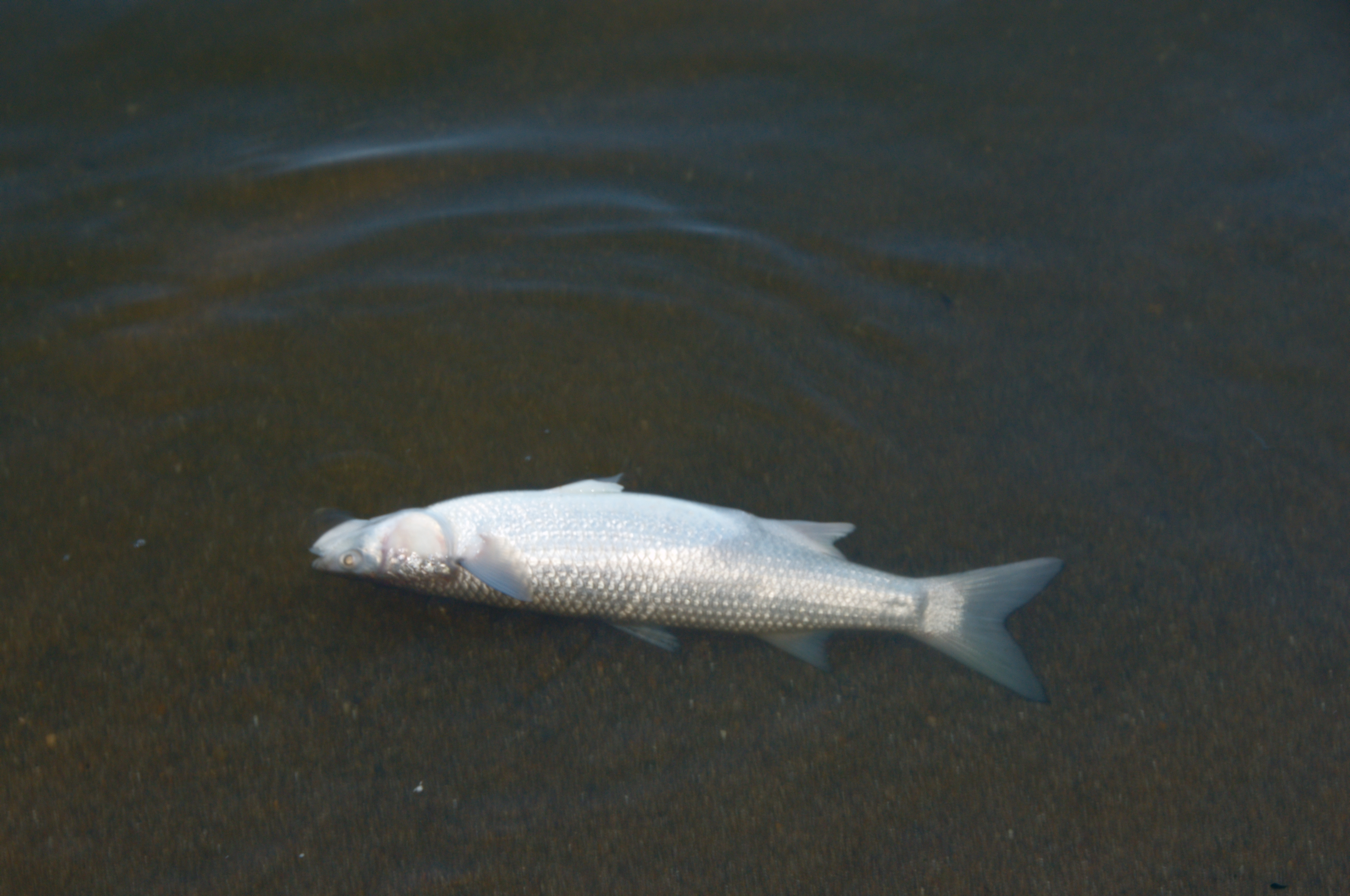 Poisson mort sur l'oued Soummam probablement une pollution aux pesticides suite à des pluies importantes